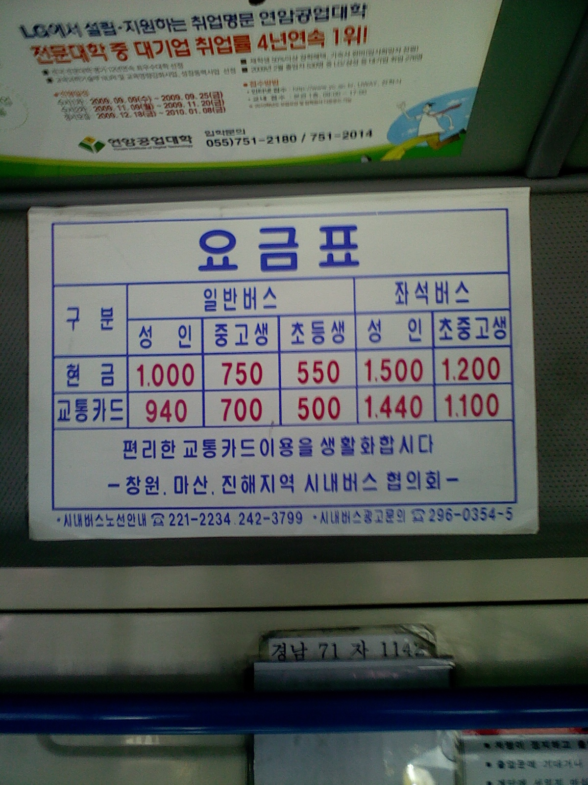 버스내부에 있는 요금표 . 자작